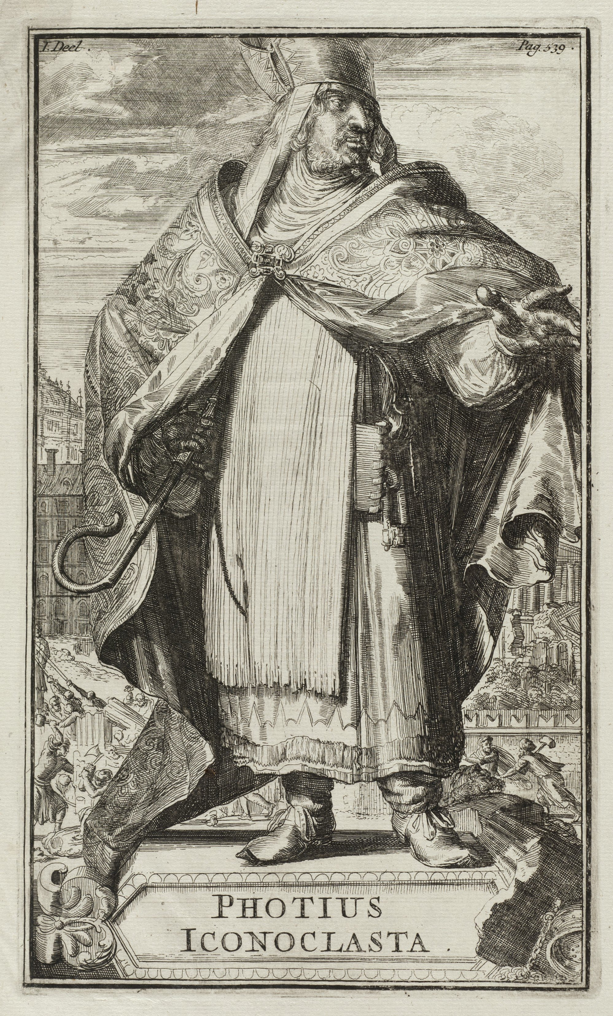 CollectieVoorhelm SchneevoogtInventarisnummerNL-HlmNHA_53008822BeschrijvingPortret van Photius Icononclasta.Illustratie uit Historie der Kerken en ketteren van den beginne des Nieuwen Testaments tot aan het jaar onses Heeren 1688 van Godfried Arnold (1701).FotonummerNL-HlmNHA_53008822DocumenttypeHistorieprenten, tekeningen en foto'sVervaardigerHooghe, Romeyn de (1645-1708) AnnotatiesLinksboven I.Deel, rechtsboven genummerd Pag.539.Zie voor de andere illustraties van portretten uit deze publicatie de inventarisnummers 53-008810 t/m 53-008833.Begindatum1701Einddatum1701TechniekGrafiek Drukwerk Trefwoordengeloofshervormers, kerkhervormers, boekillustraties